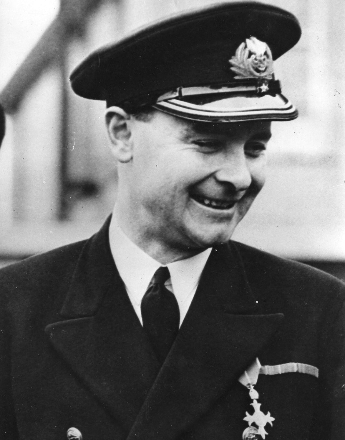 Commander Tadeusz Gorazdowski honored with OBE